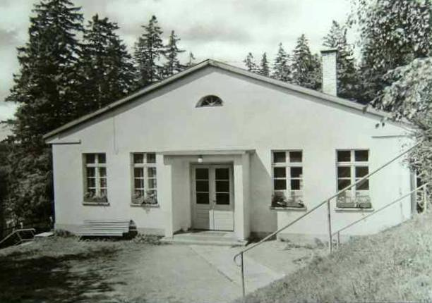 Pionierferienlager des VEB Maxhütte Unterwellenborn in Gottesberg